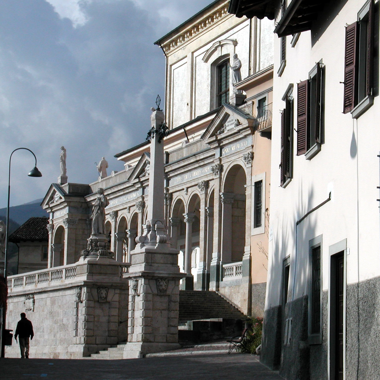 Clusone. Provincia di Bergamo Val Seriana, Italy